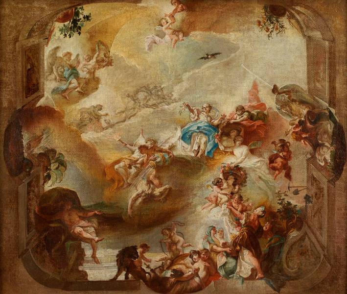 Entwurf für die Ausmalung des Festsaals in der Sommerresidenz in Eichstätt